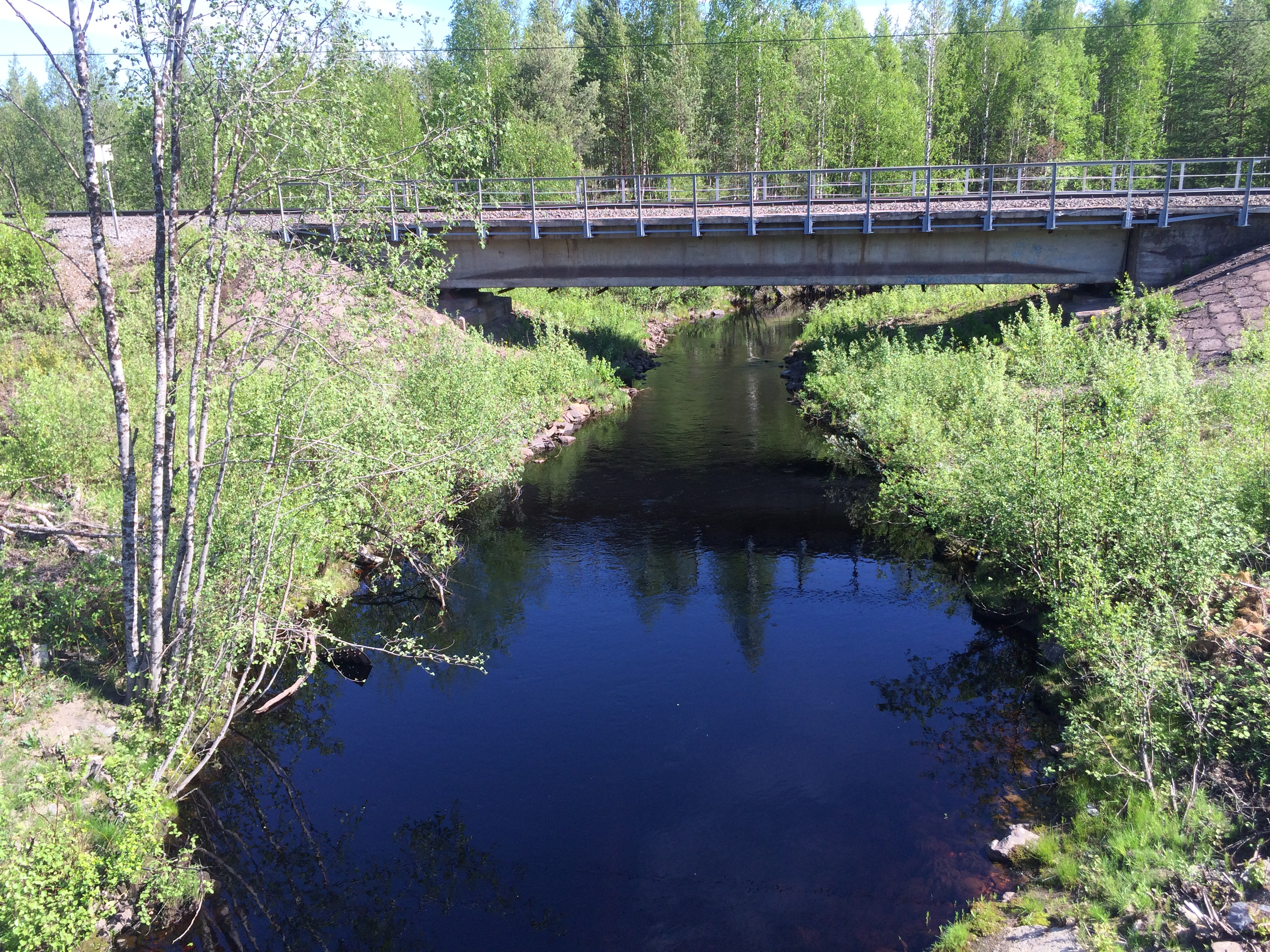 Хейпойоки